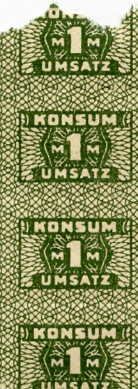 Konsummarken über 1 Mark der Konsumgenossenschaft der DDR / Rabattmarke